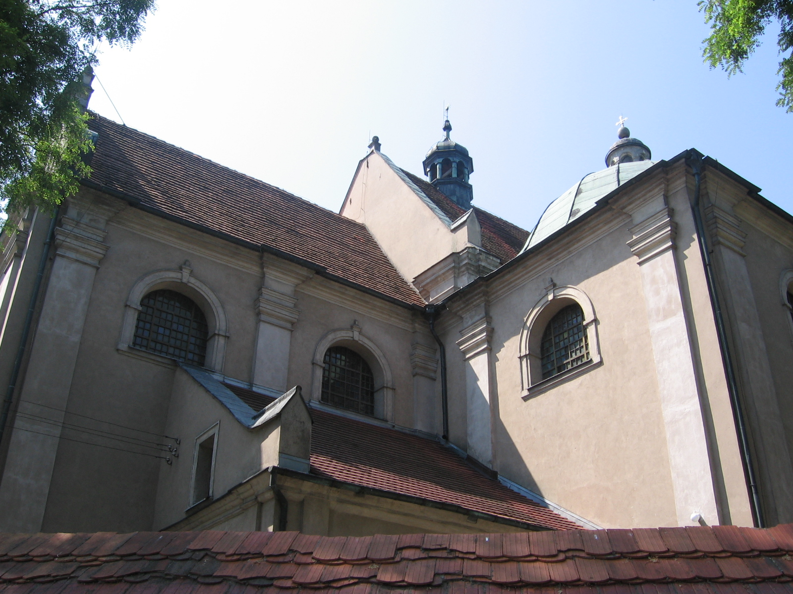 Kościół p.w. Wnieb. NMP w Złotowie